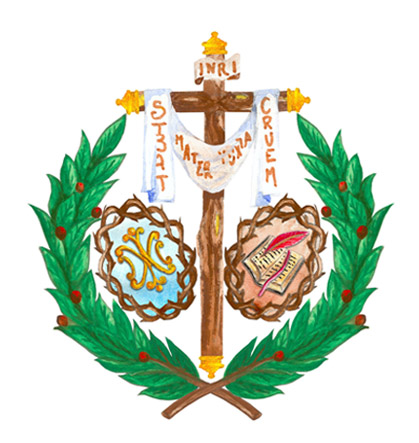 Escudo de la Hermandad de la Soledad de San Fernando